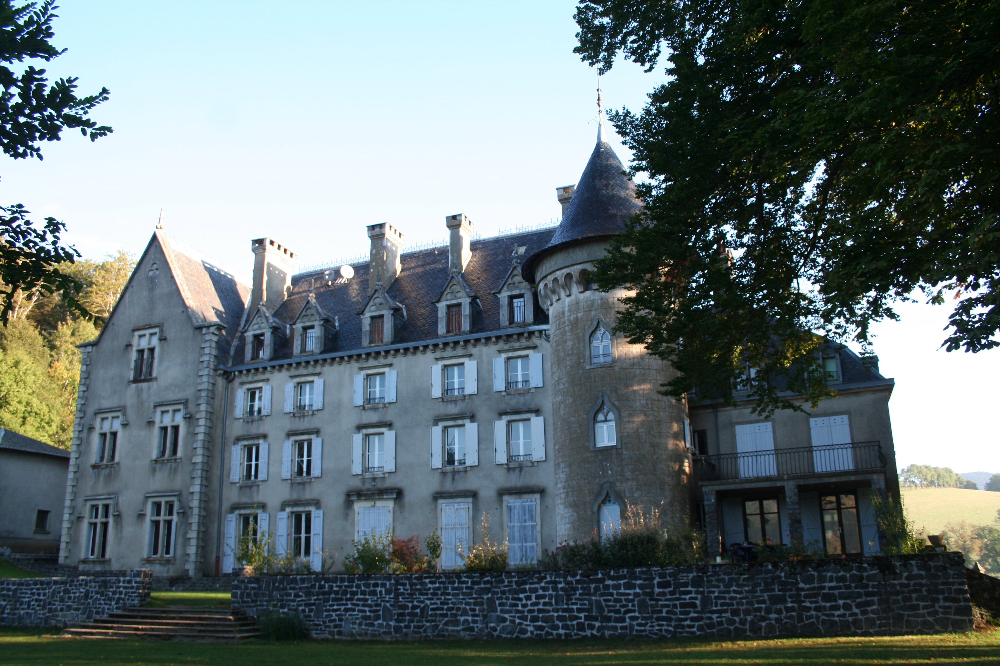 Lacaune (Tarn) - château de Calmels.